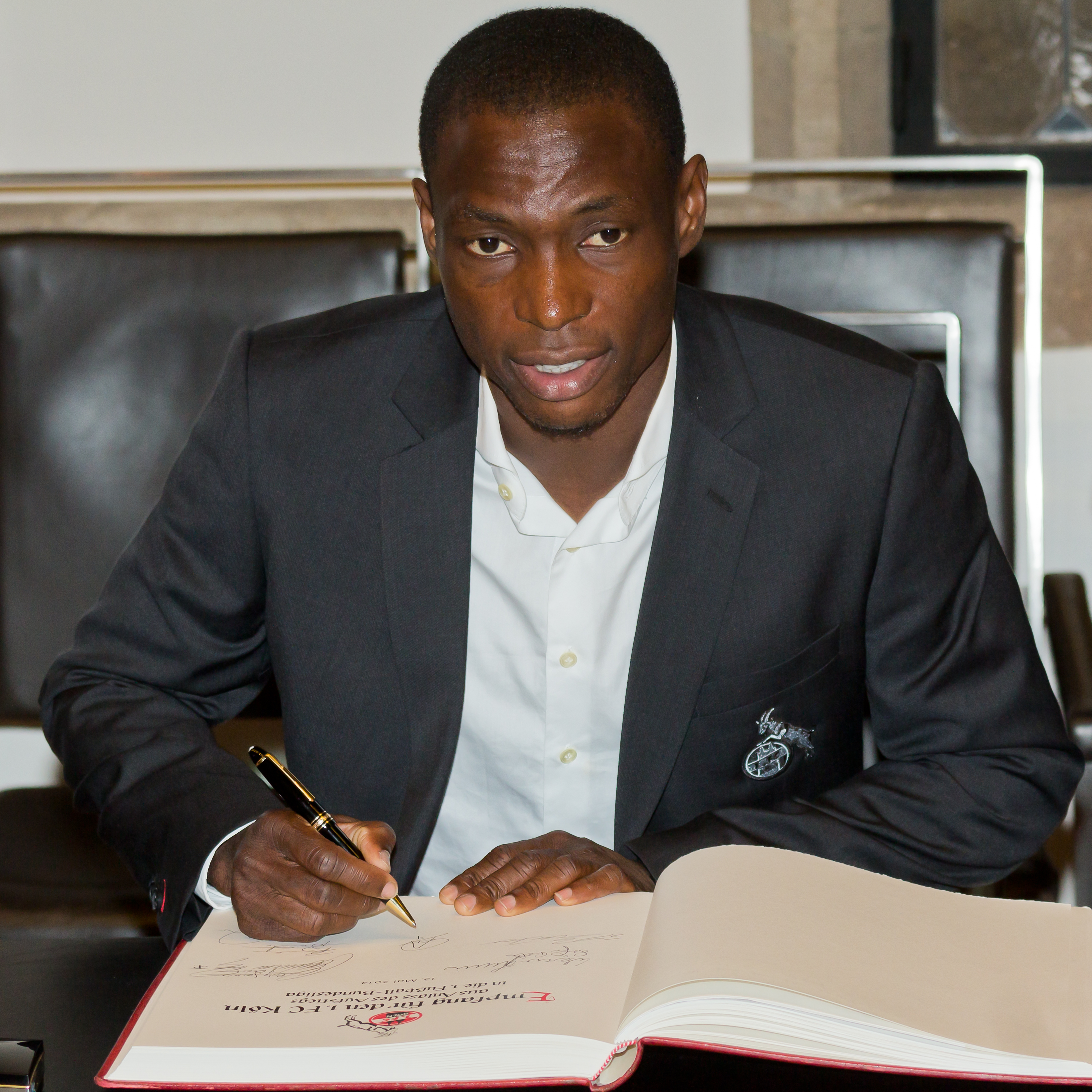 Empfang für den 1. FC Köln im Rathaus. Stürmer Anthony Ujah